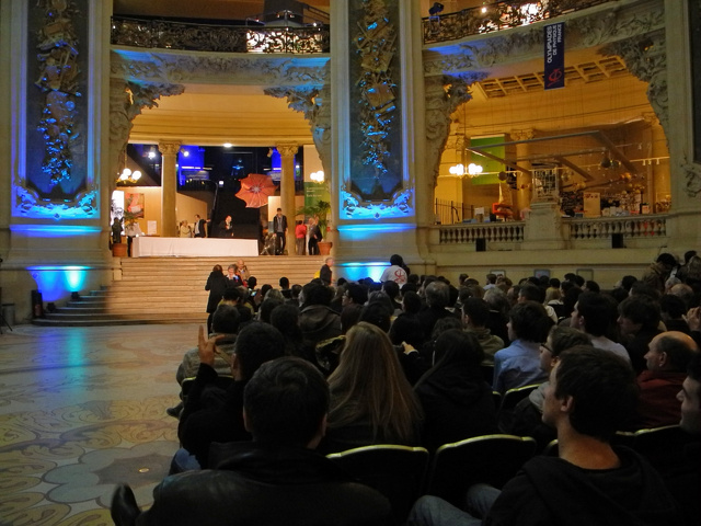 Finale Olympiades de Physique - Palais de la Découverte